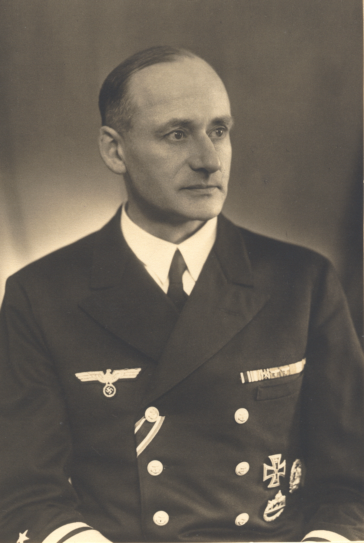 Porträtfotografie von Vizeadmiral Walter Lohmann